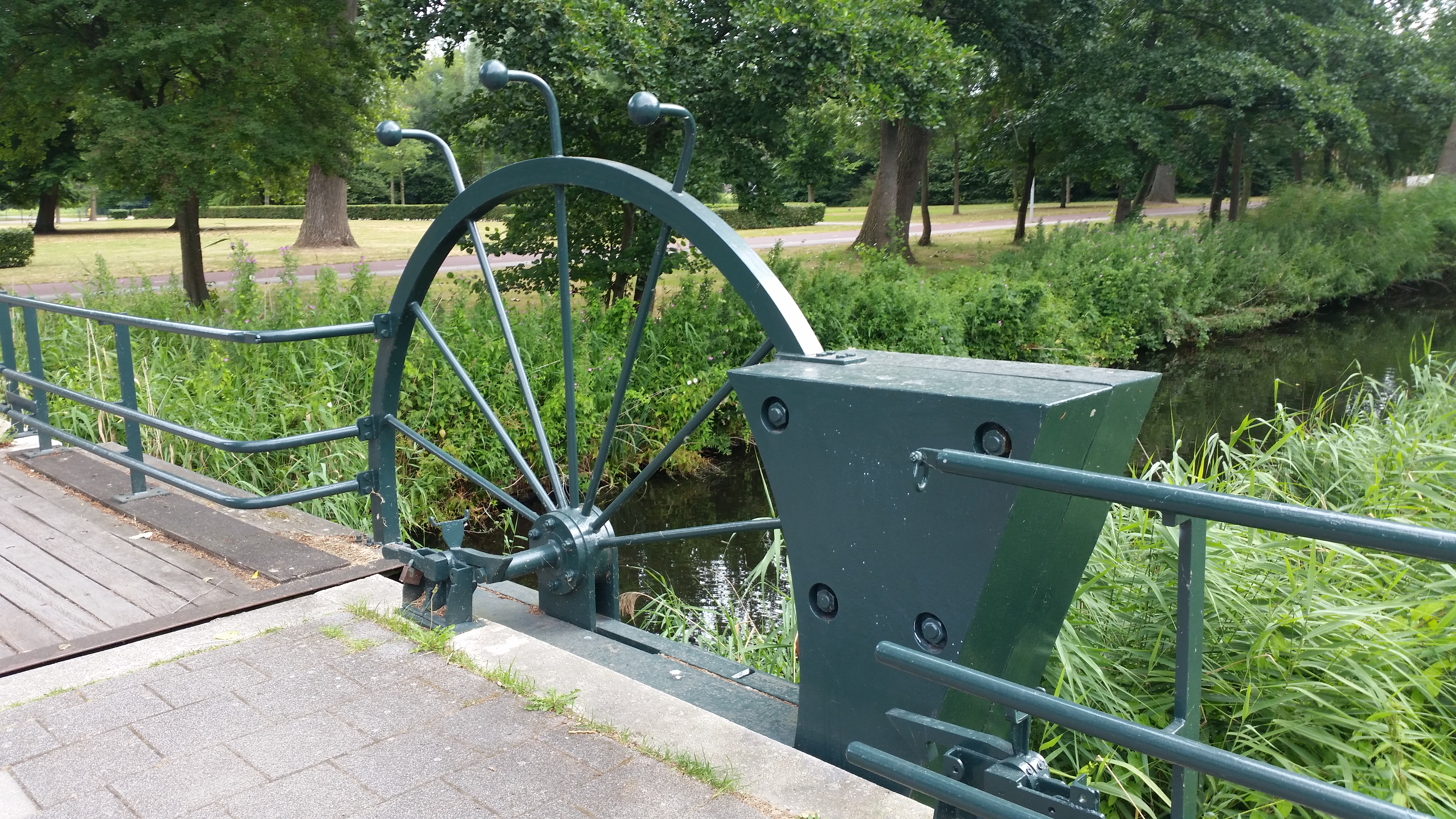 Brug 626 (in Amsterdam); contragewicht en aandrijving